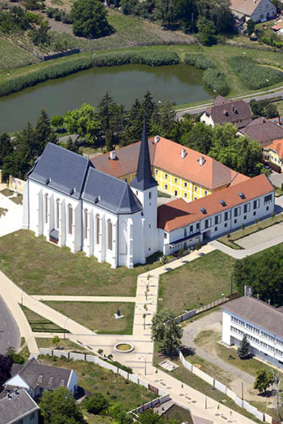 Légi fotó a nyírbátori minorita templomról és rendházról